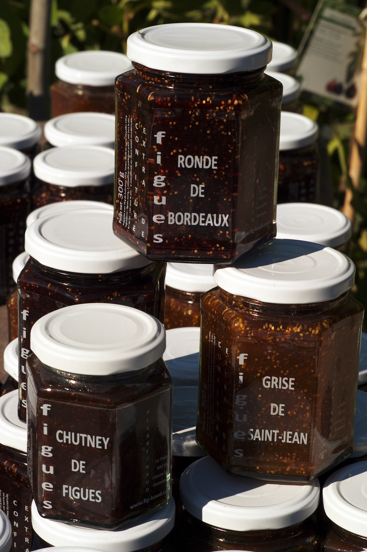 Confitures de figues